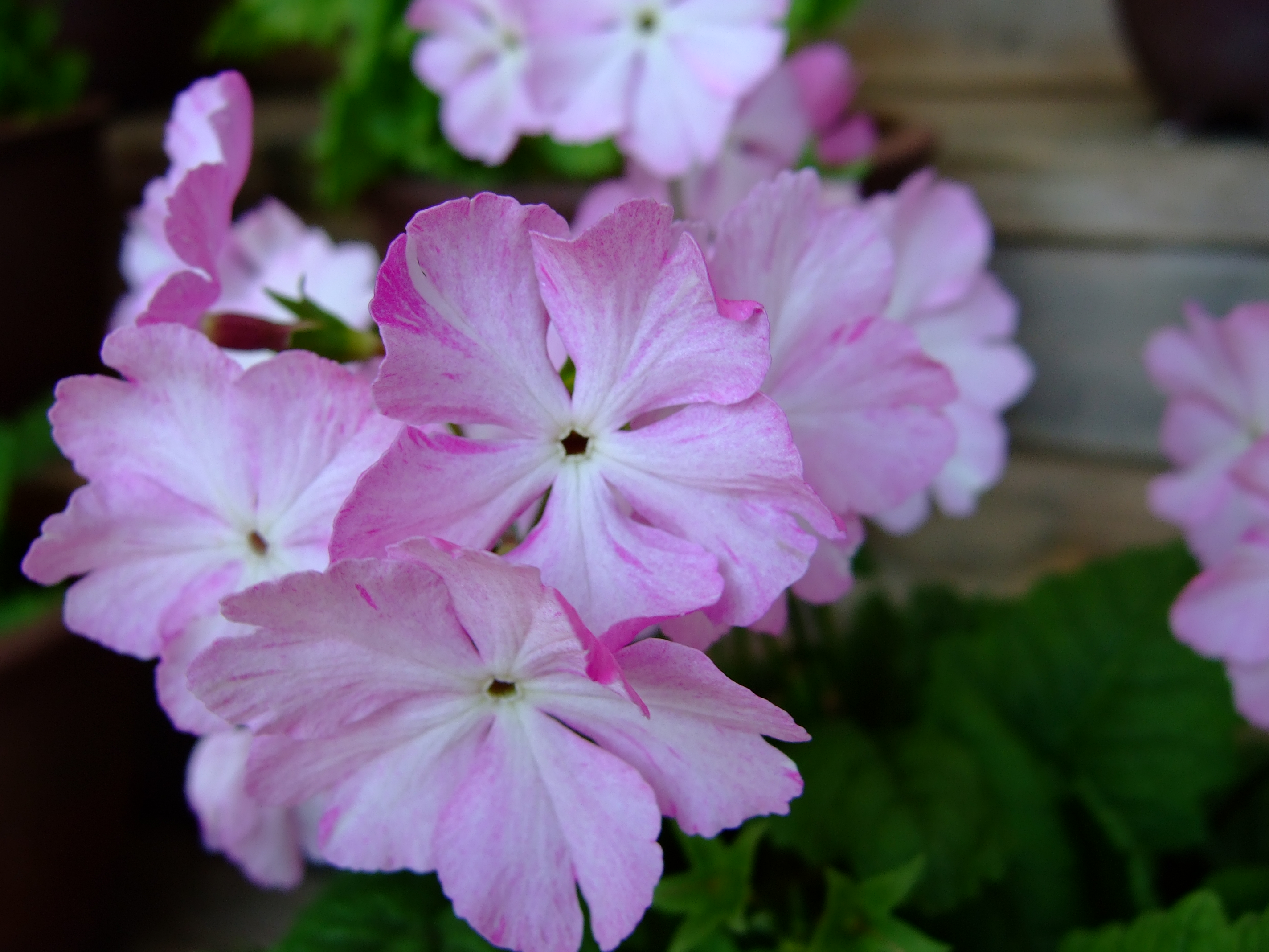 兵庫県立フラワーセンター サクラソウ